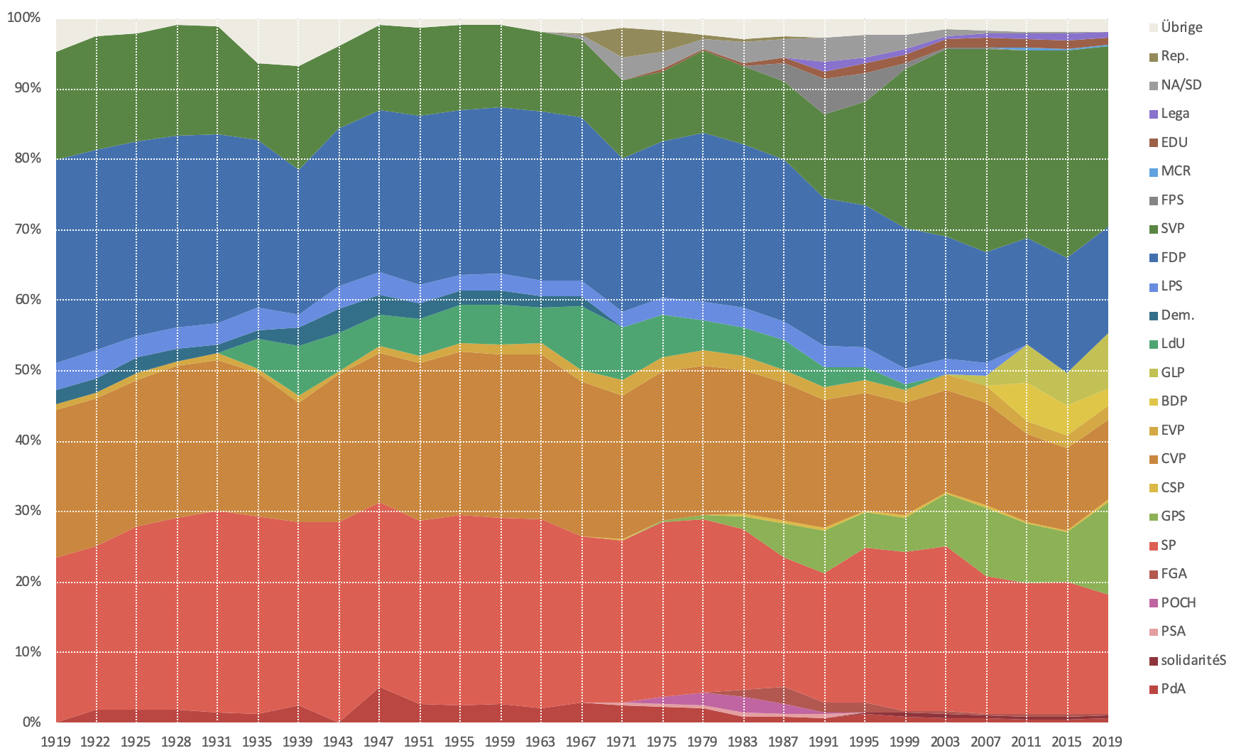 Entwicklung der Wähleranteile bei Nationalratswahlen 1919-2019